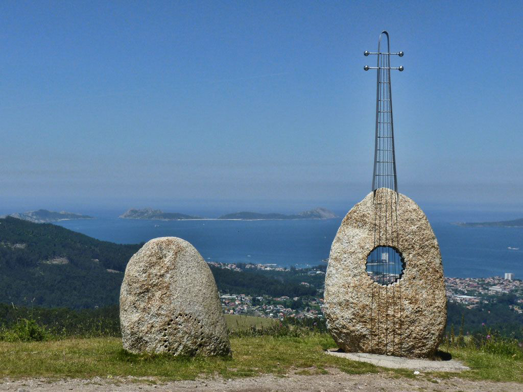 Vigo. Mirador do Cepudo, Serra do Galiñeiro